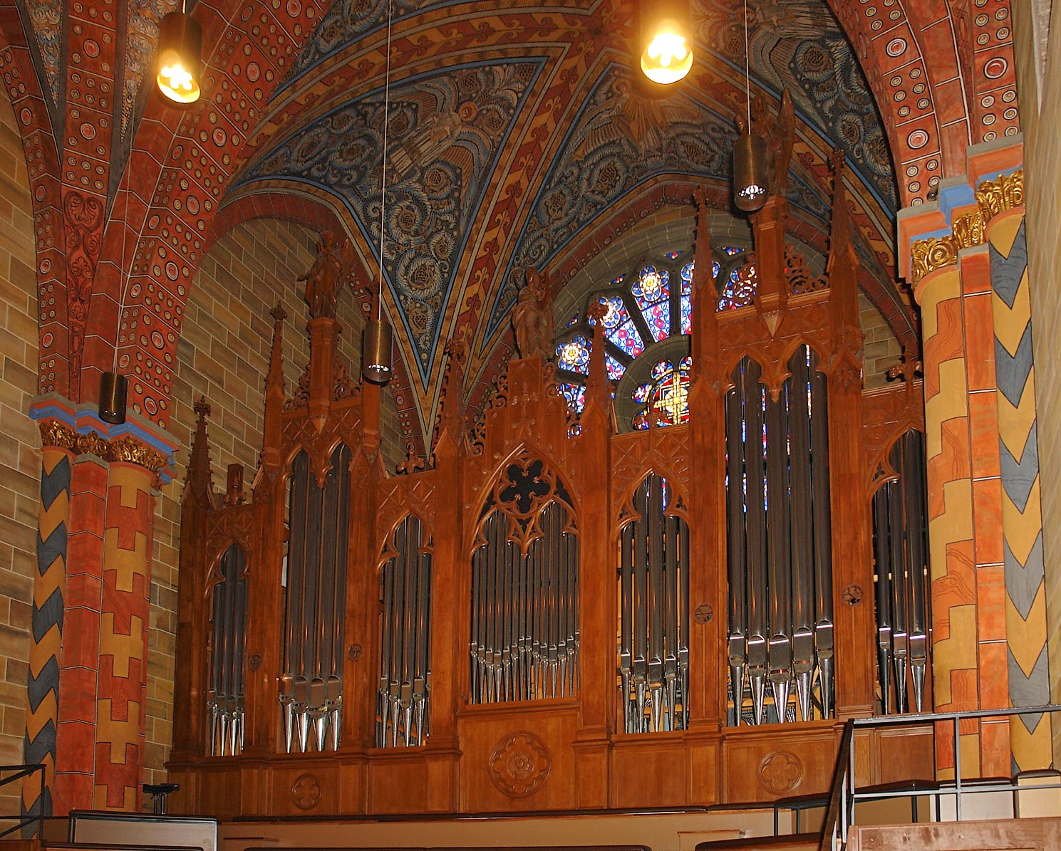 Bremer Dom: Prospekt der Sauer-Orgel auf der Empore